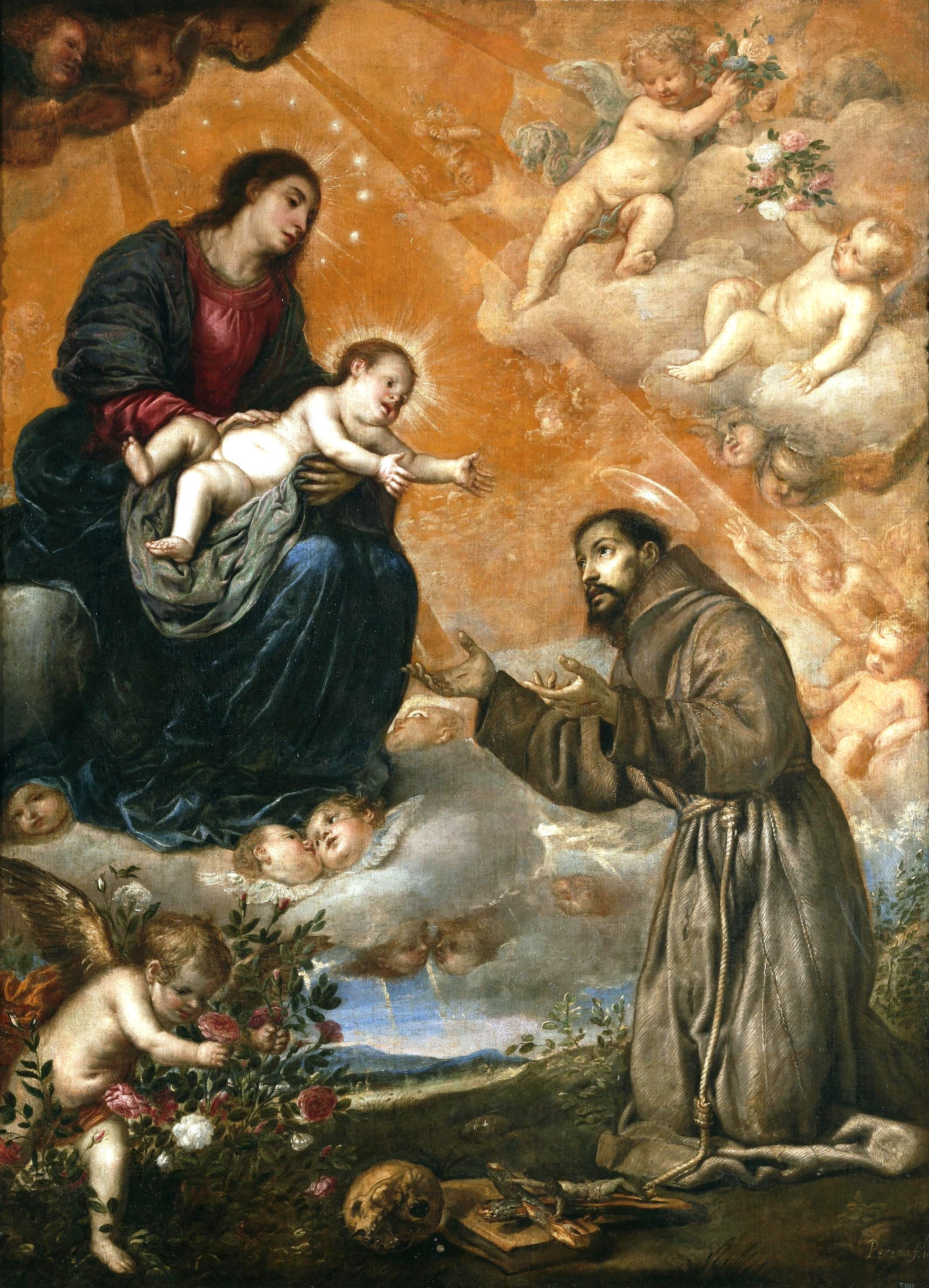 La obra representa a San Francisco de Asís, el fundador de la Orden de los franciscanos, arrodillado ante la Virgen María y el Niño Jesús.